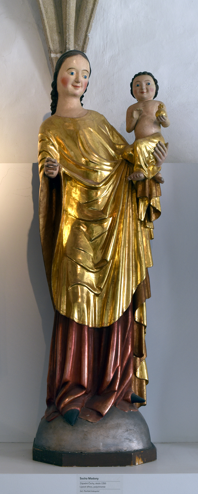 Madona ze Seče (kolem 1350), Muzeum církevního umění plzeňské diecéze